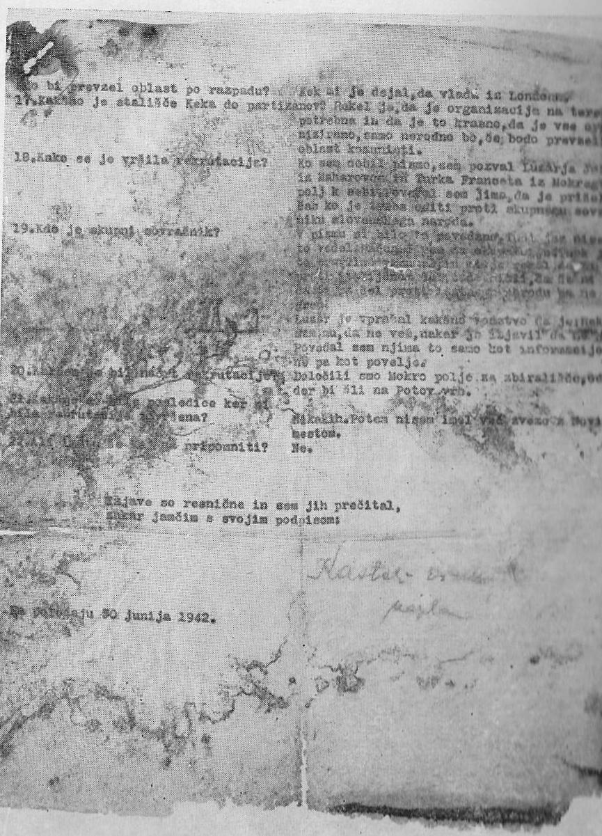 Zapisnik zaslišanja kaplana Kastelica 30. junija 1942